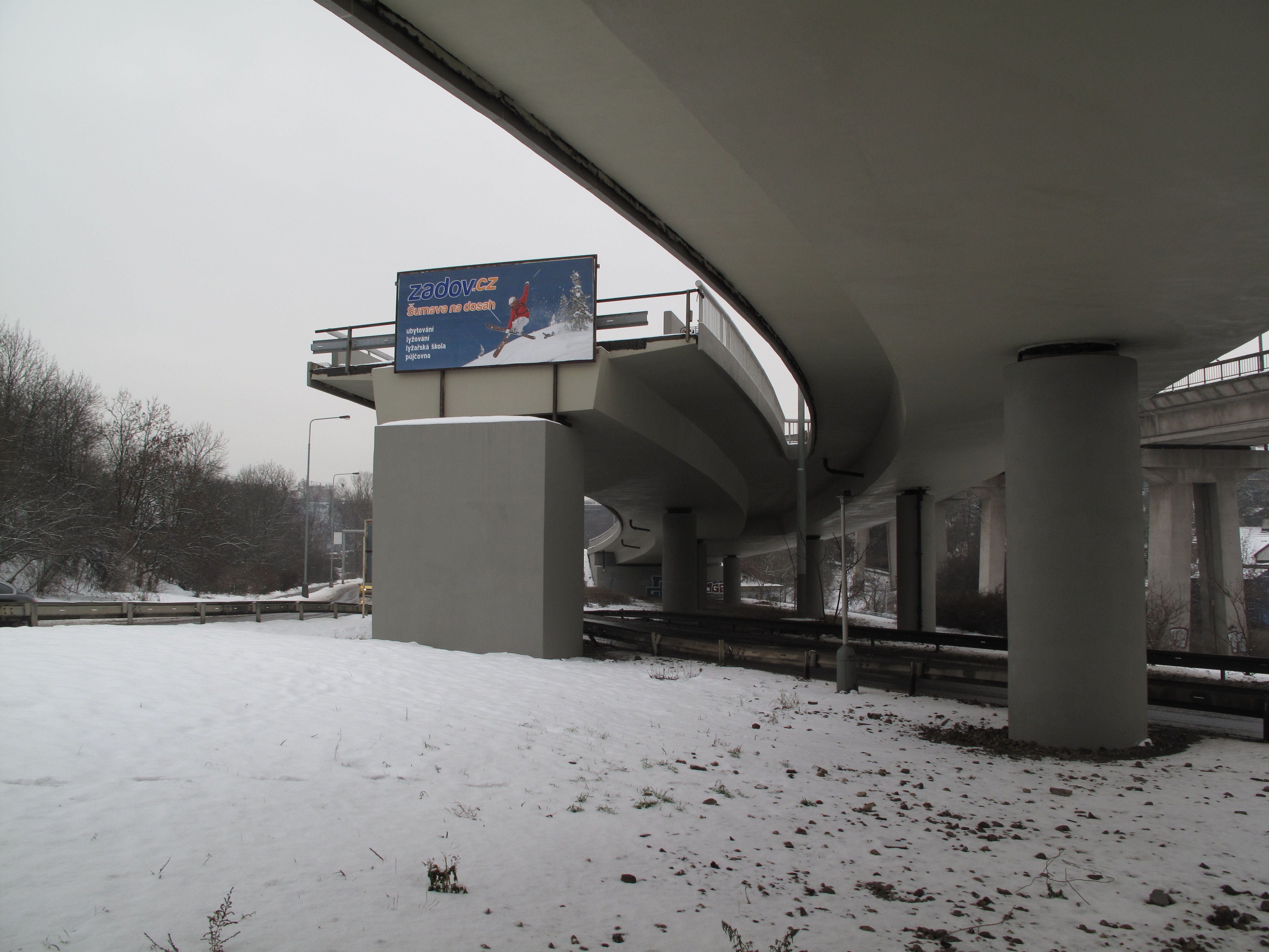 Mosty v Libni